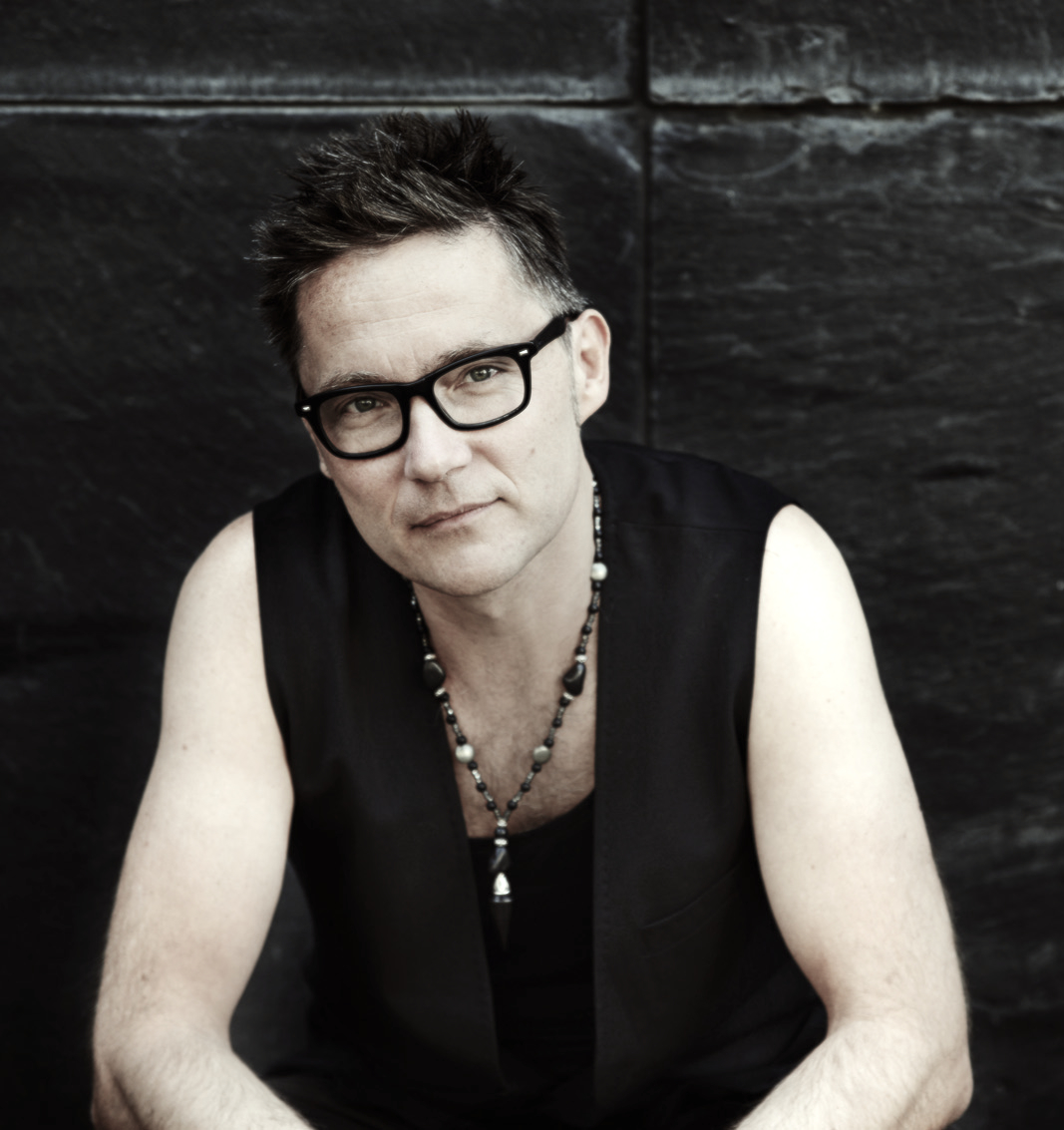 Jens Fischer Rodrian alias f i s c h e r